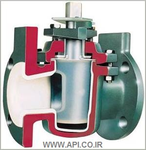 شیر سماوری بدون نیاز به گریسکاری